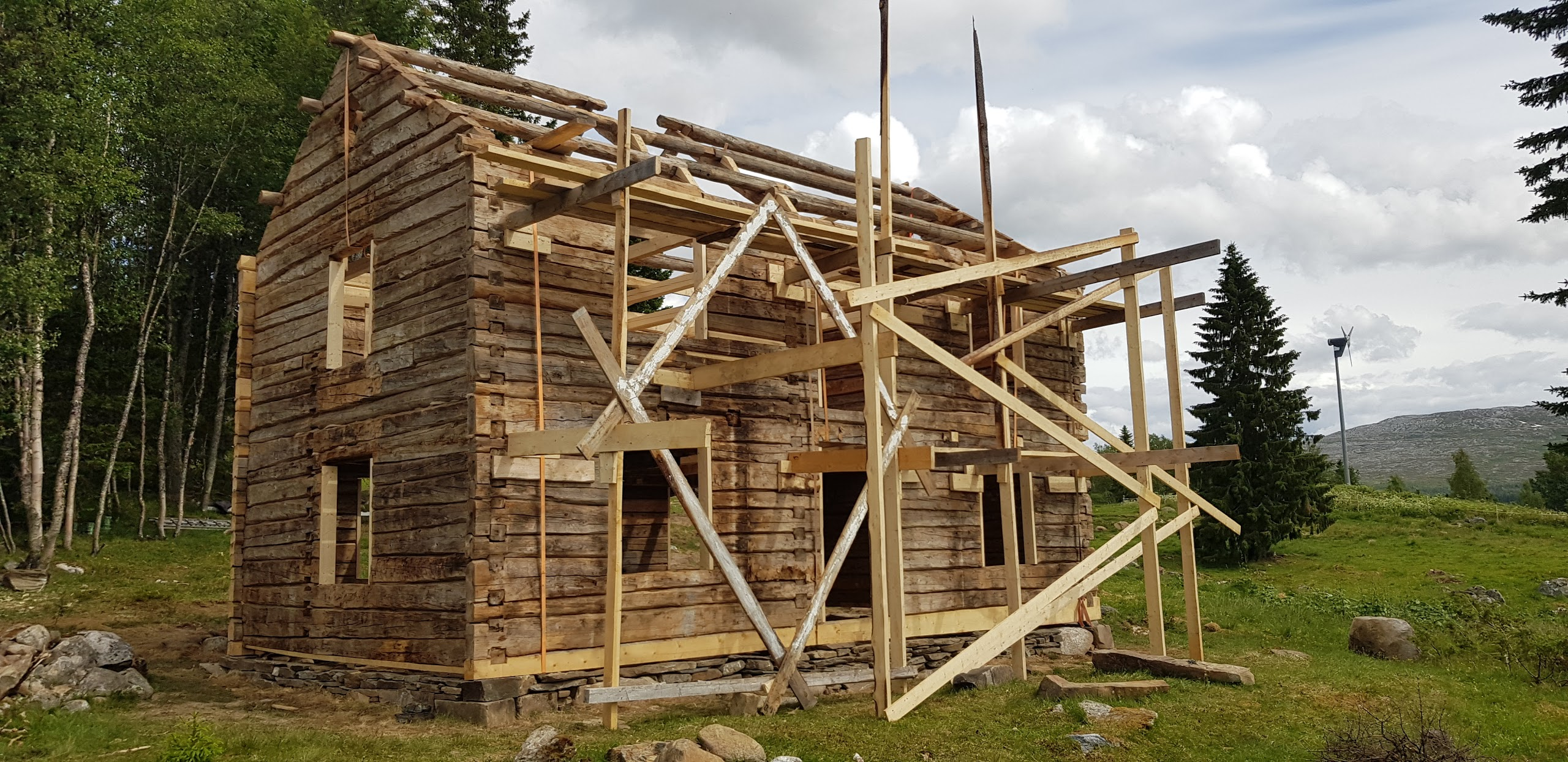 Hovedkvarteret til Operasjon Rype på Gjefsjøen Fjellgård under andre verdenskrig. Foto: Lars Bugge Aarset